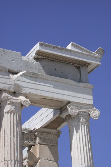 Erechthéion, détail Date : 16 avril 2004 Auteur : Ifernyen Source : Archives personnelles Statut : GFDL Catégorie:Image d'architecture grecque antique